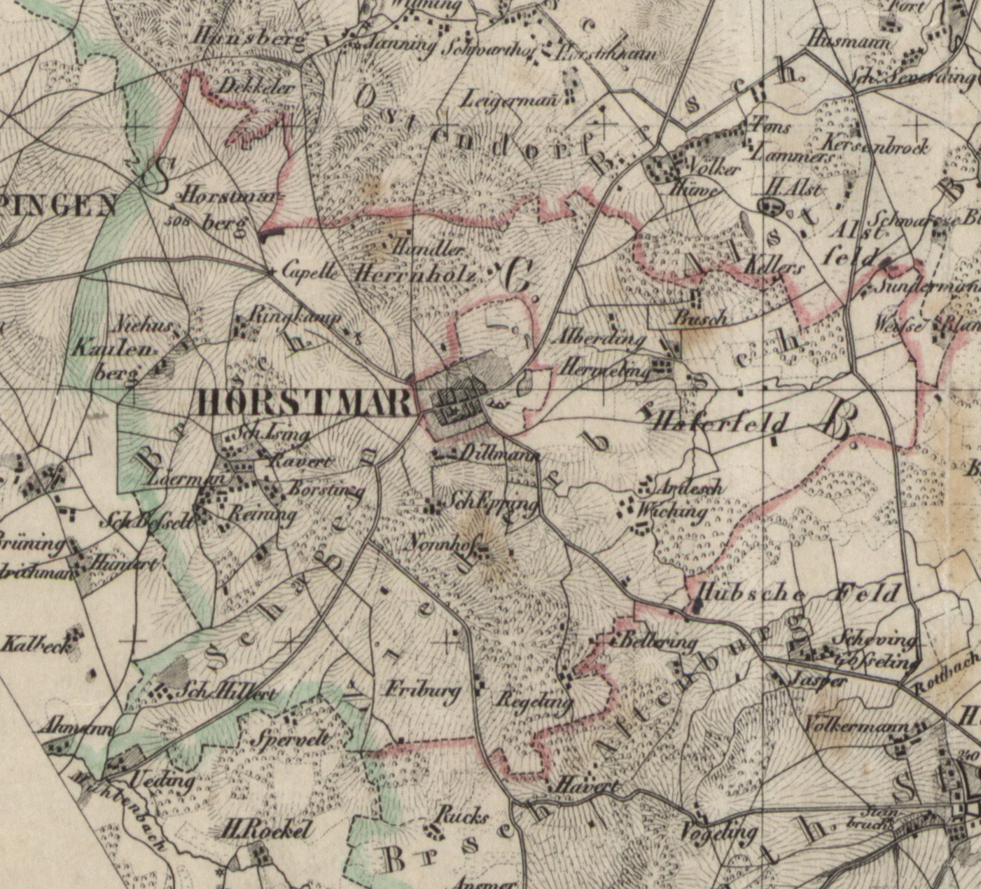 Location of Stadt and Kirchspiel Horstmar